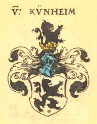 Wappen der Elsässischen, Schlesischen und Preussischen Adelsfamilie Künheim (Kuenheim).